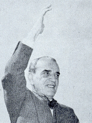 President of Mexico - Adolfo Ruiz Cortines diciendo "Chingen a su madre todos"